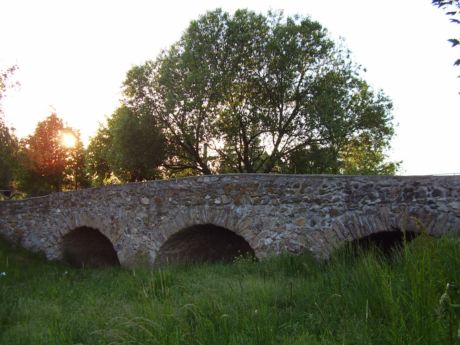 Turecký most v Novej Vsi nad Žitavou